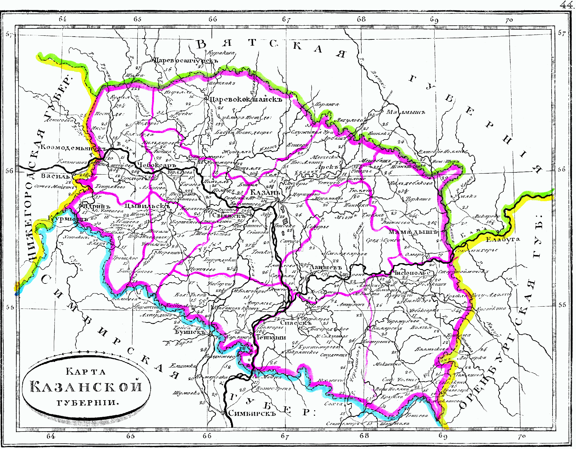 Карта Казанской губернии, 1835